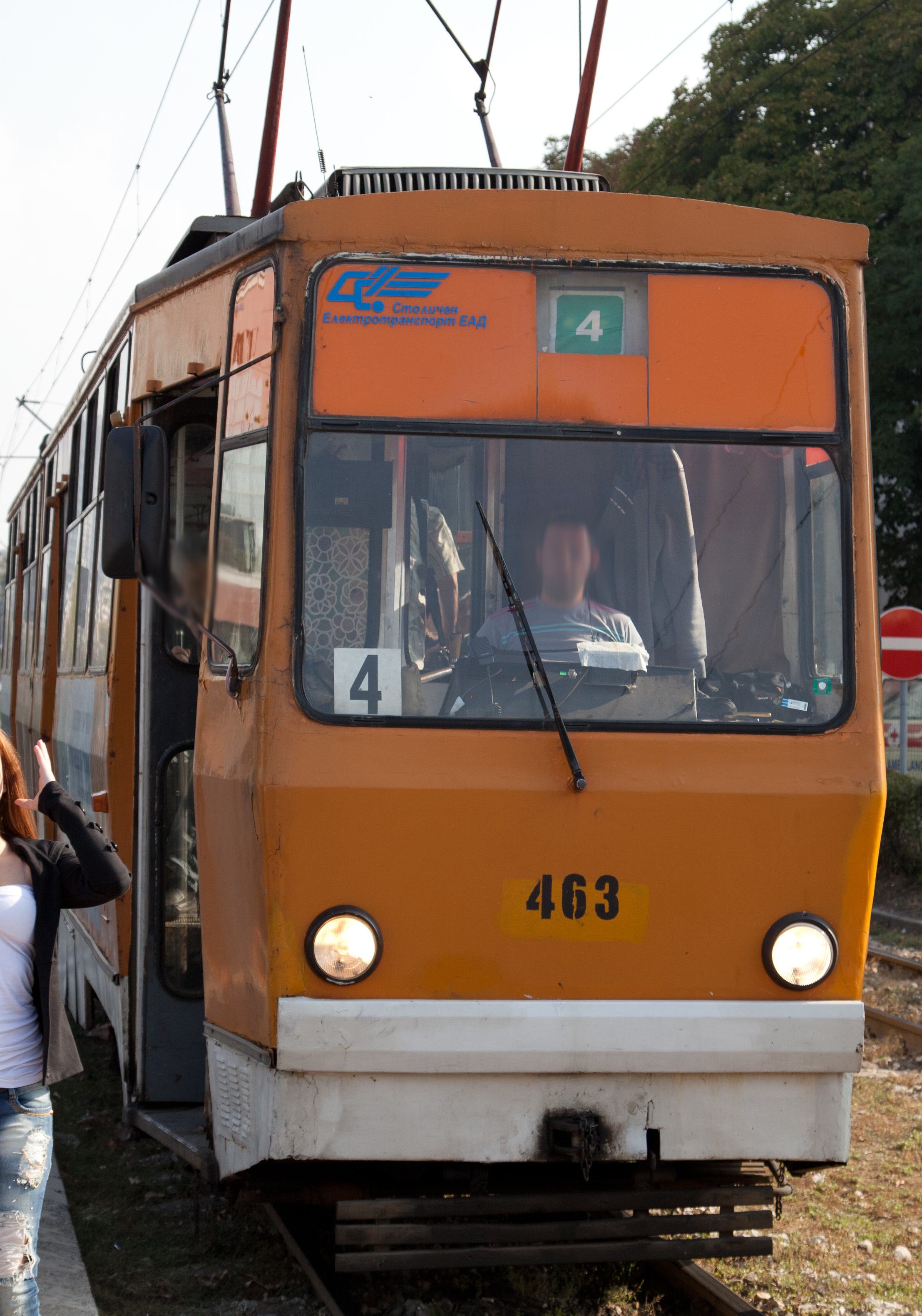 Straßenbahn in Sofia